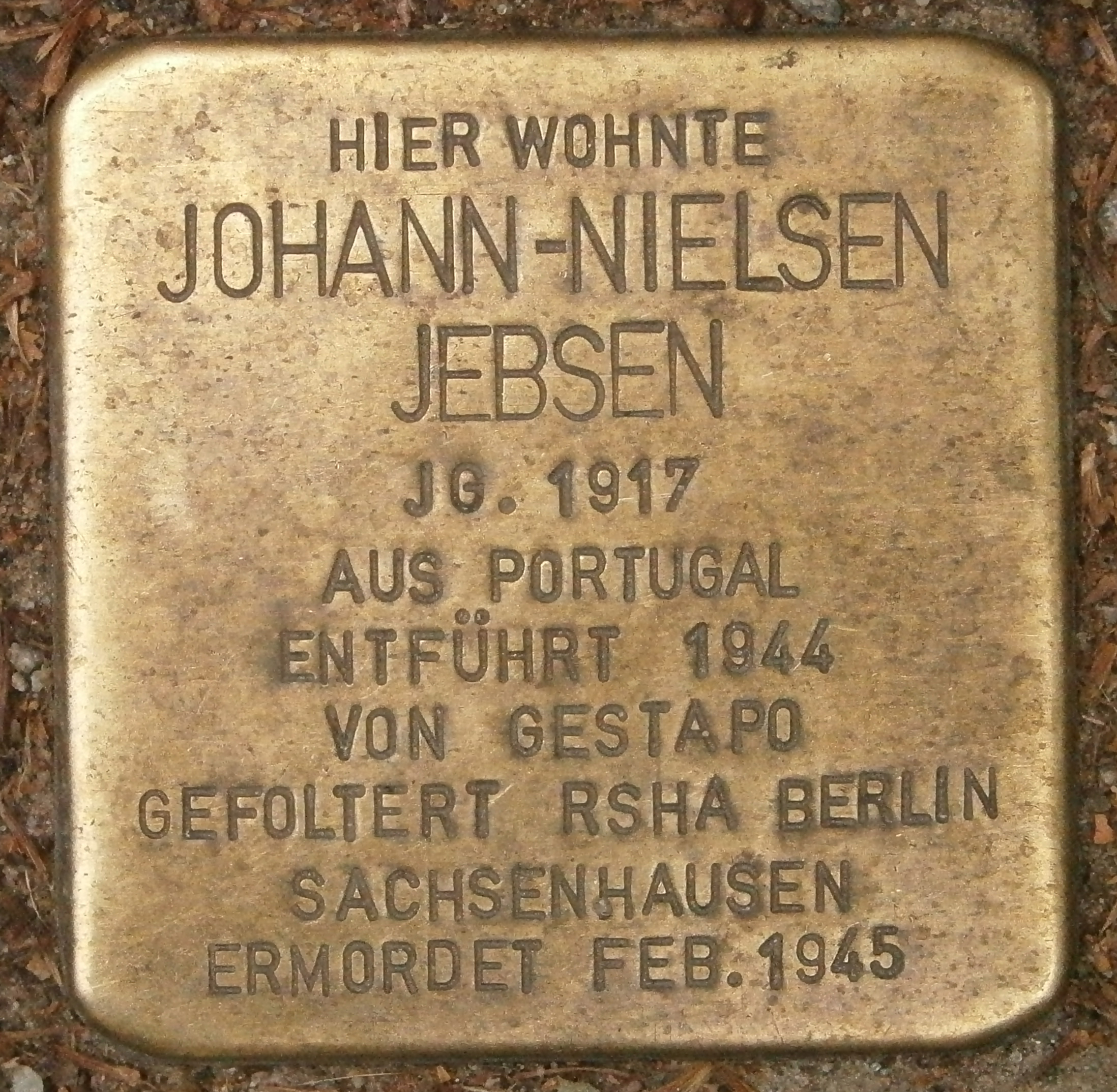 Stolperstein für Johann-Nielsen Nebsen